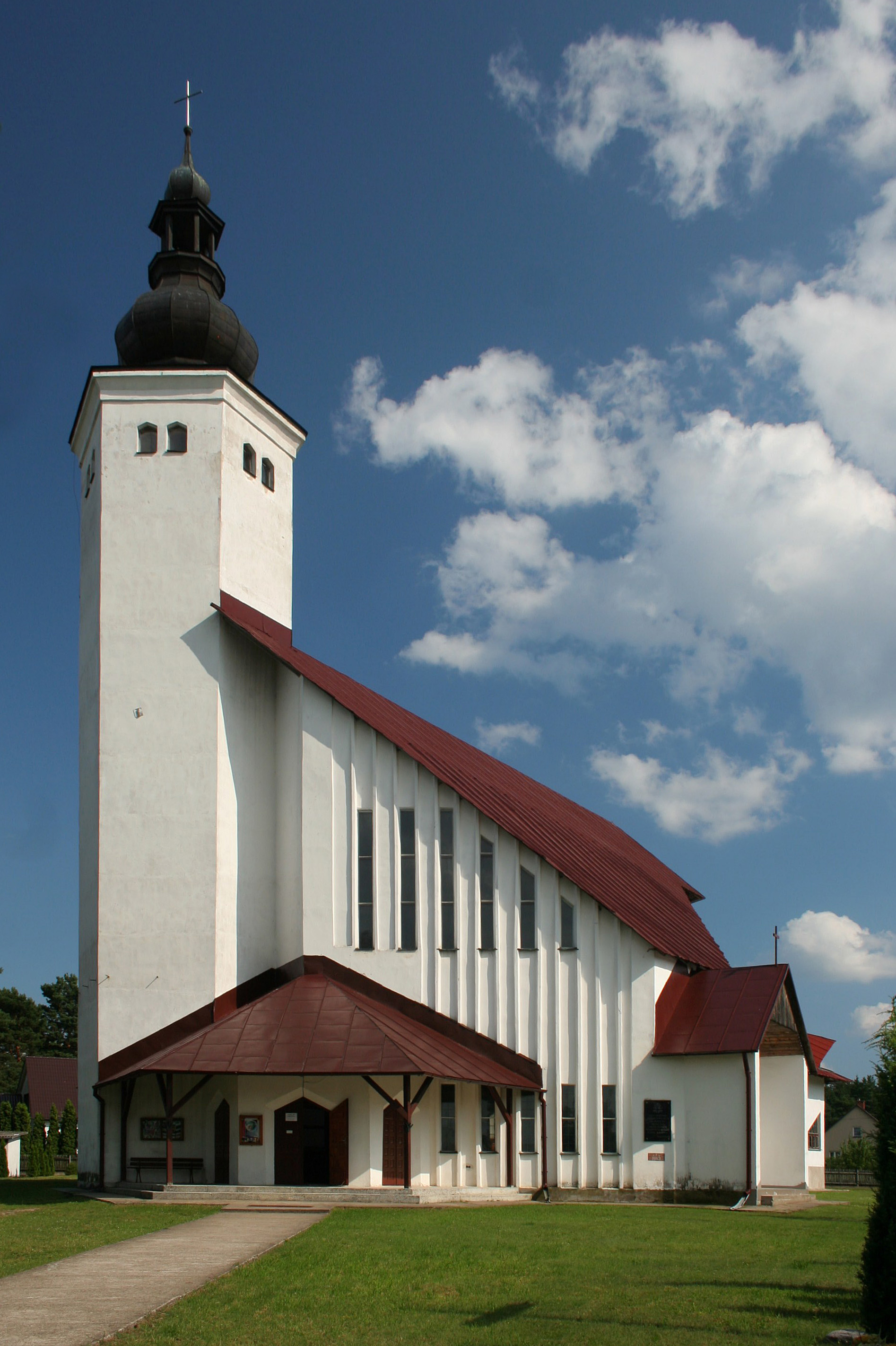 Kościół Maksymiliana Kolbego we wsi Gawrych-Ruda.